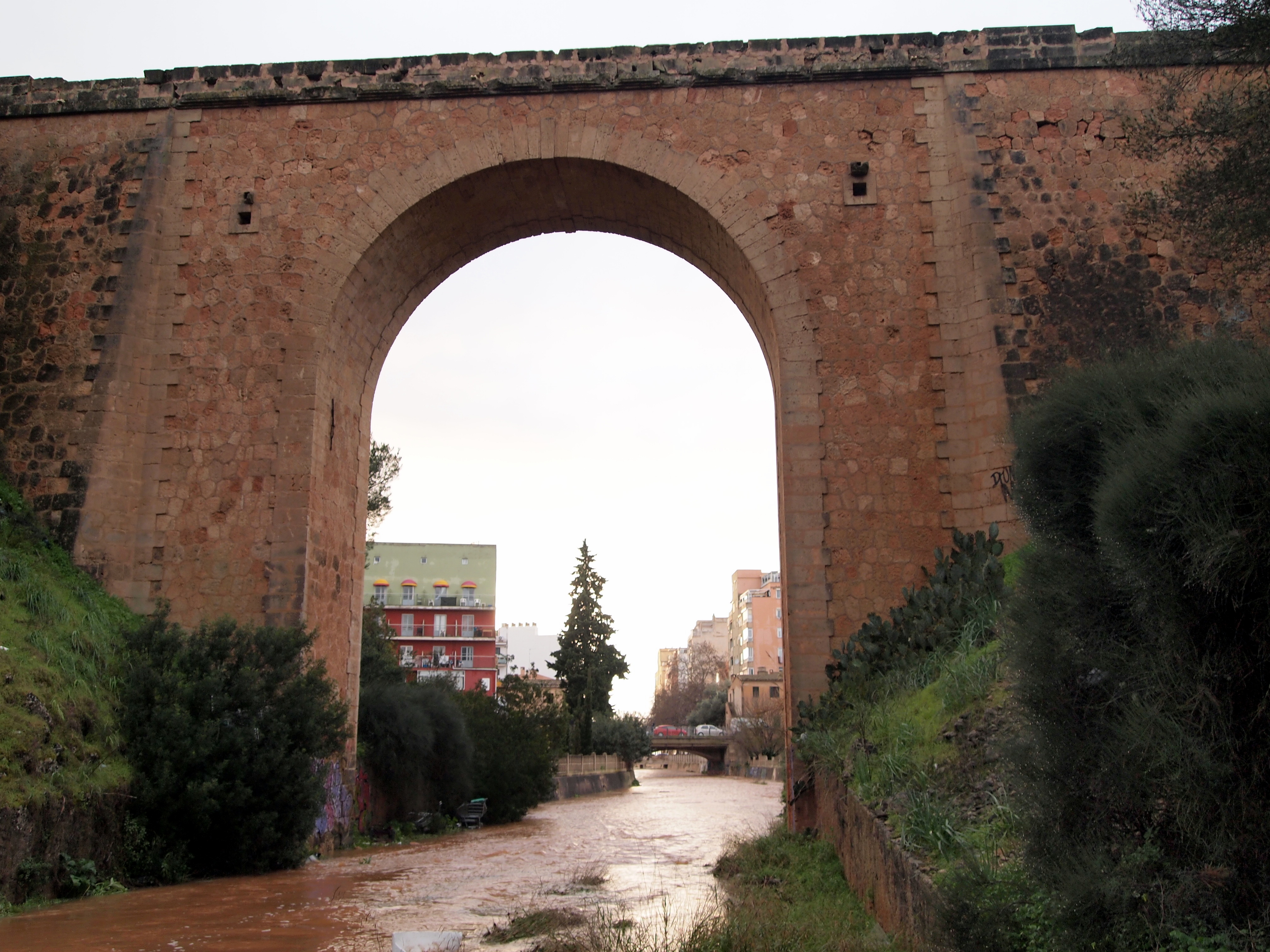 Torrent del Jueus passant sota el viaducte del tren que anava de Palma a Santanyí (21 gener 2017)